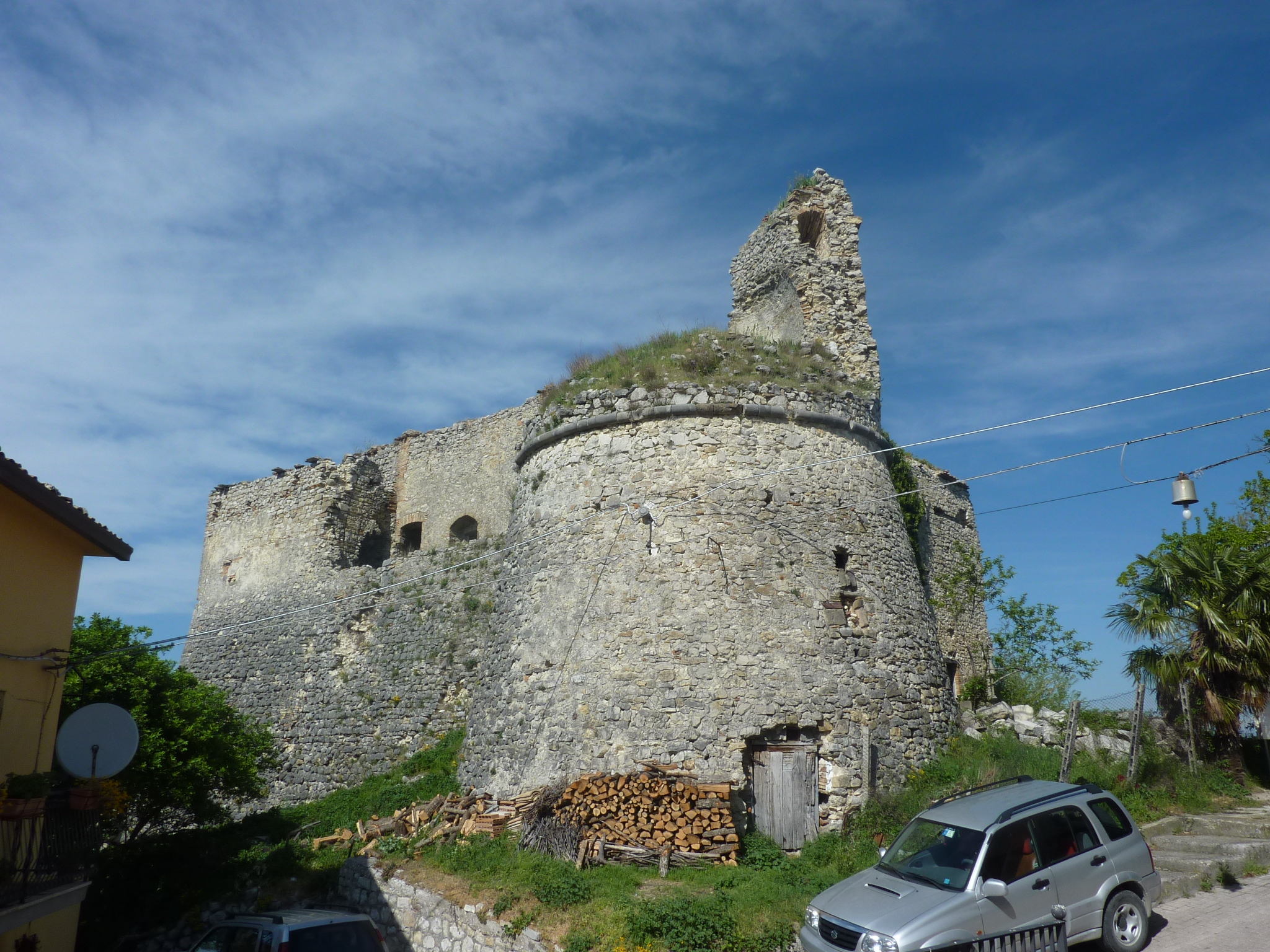 Bastione del castello